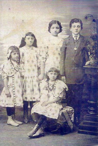 Osvaldo Artico e suas irmãs